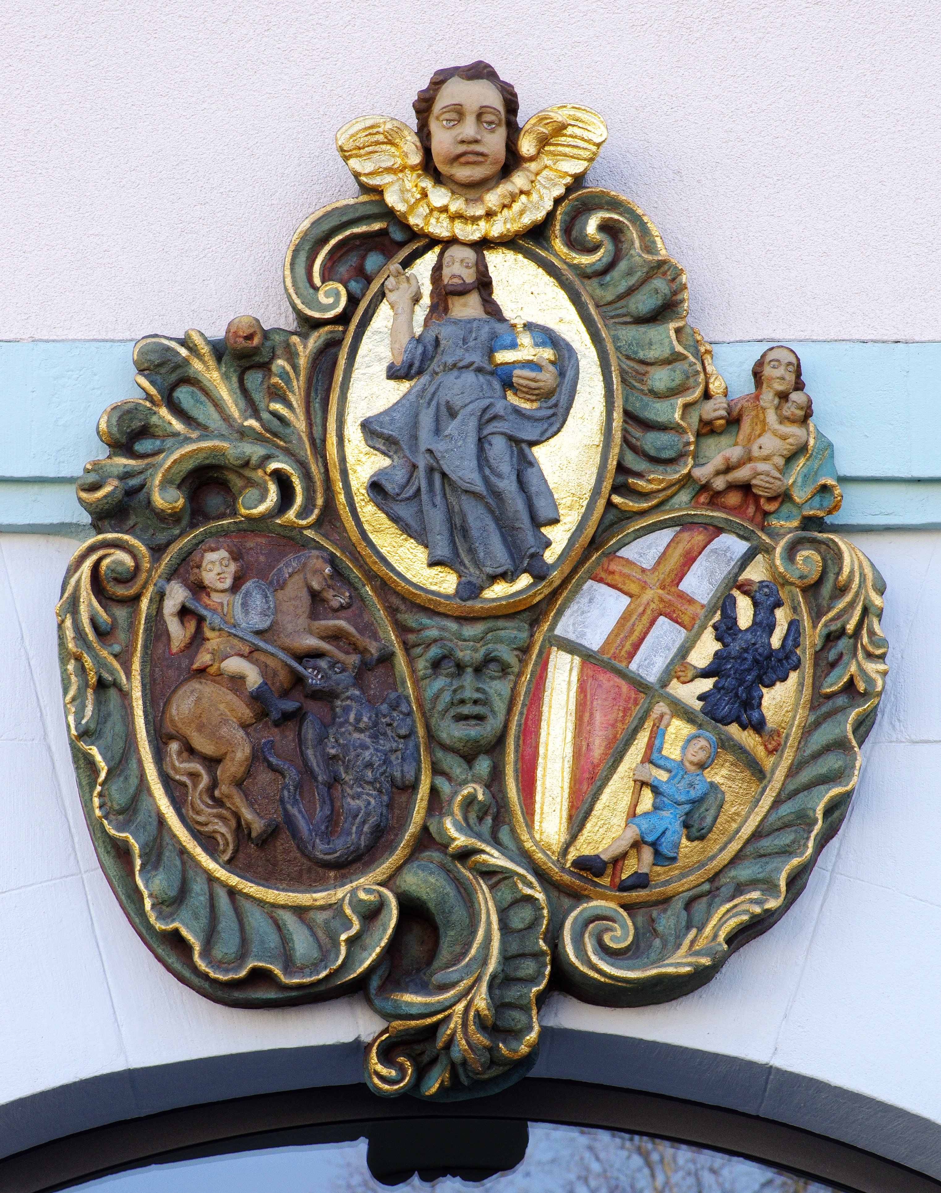 Kartusche über dem Eingang des Jugend und Sozialamts, restauriert 2011. Wappenkartusche über dem Eingang der ehemaligen Karlskaserne die drei Stände symbolisierend: Oben steht der die Welt erhaltende Christus für den Prälatenstand, unten links kämpft der Heilige Georg, der die Ritterschaft repräsentiert. Rechts unten die Bürgerschaft dargestellt mit den vier Direktorialstädten des dritten Standes: Links oben Freiburg, daneben der Breisacher Reichsadler, unten links Neuenburg am Rhein und daneben das Waldshuter Männle als Waldhüter gedeutet.